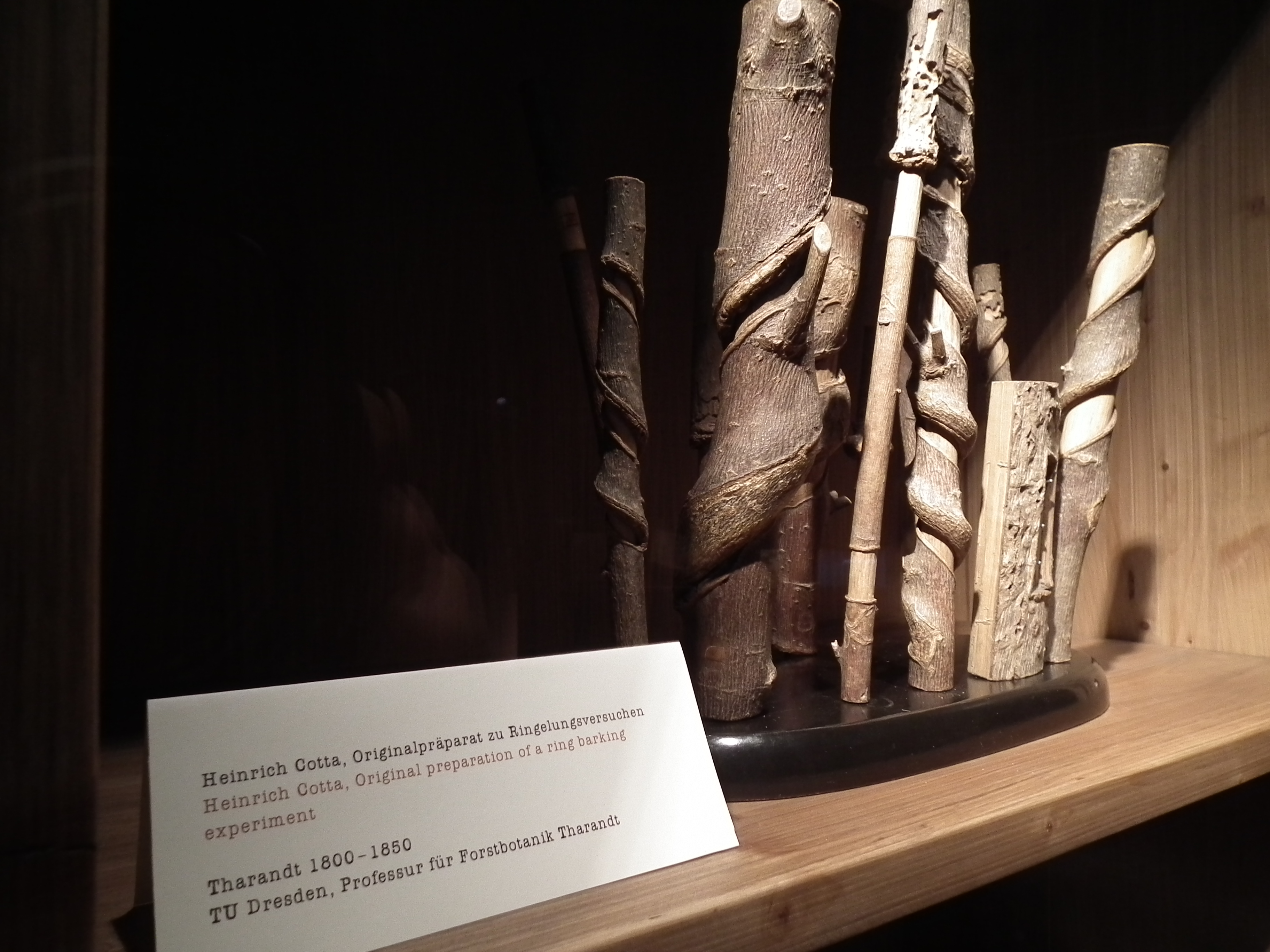 Rundgang durch das Staatliche Museum für Archäologie Chemnitz